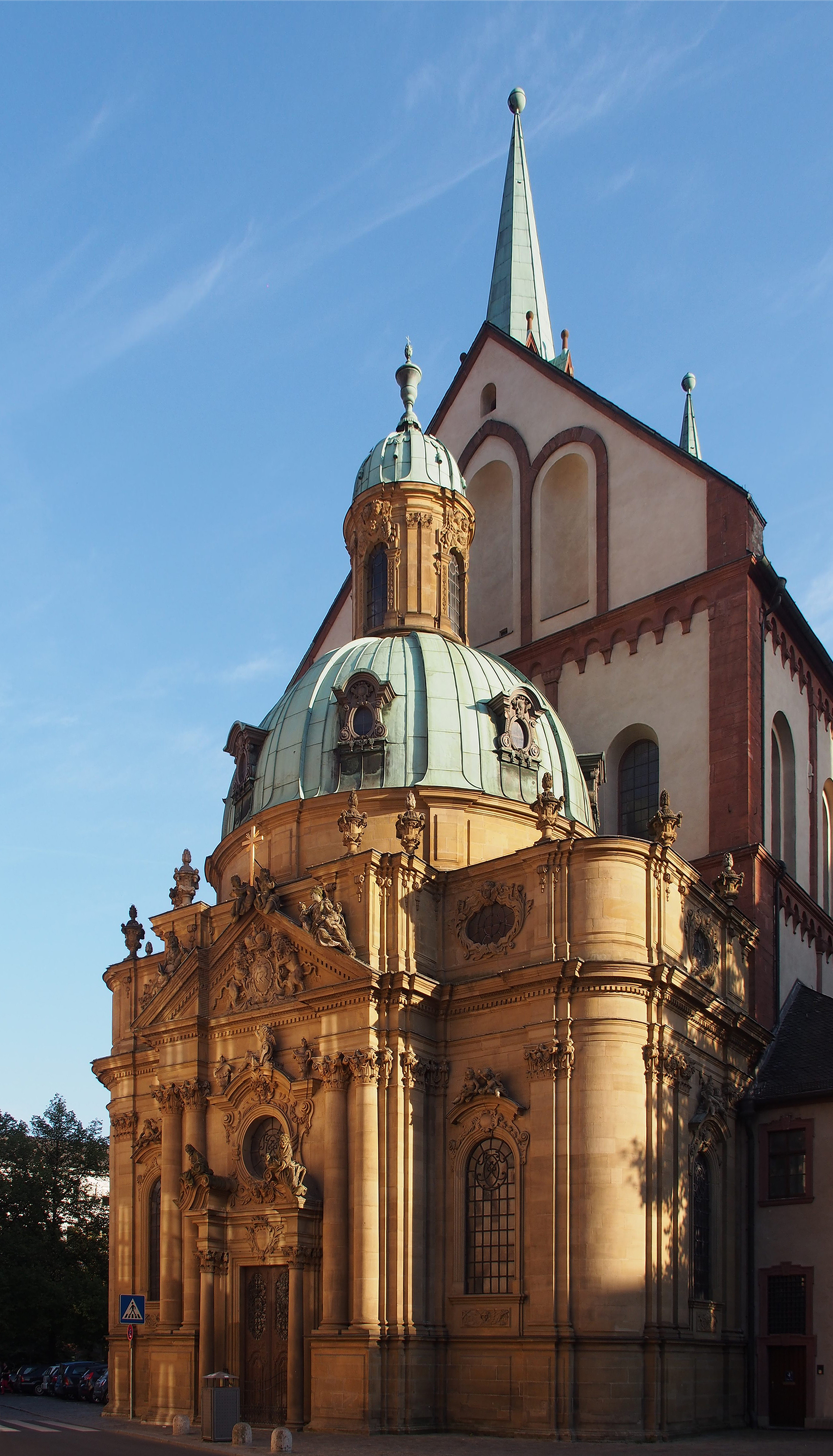 Schönbornkapelle, dahinter Domkirche St. Kilian, Würzburg